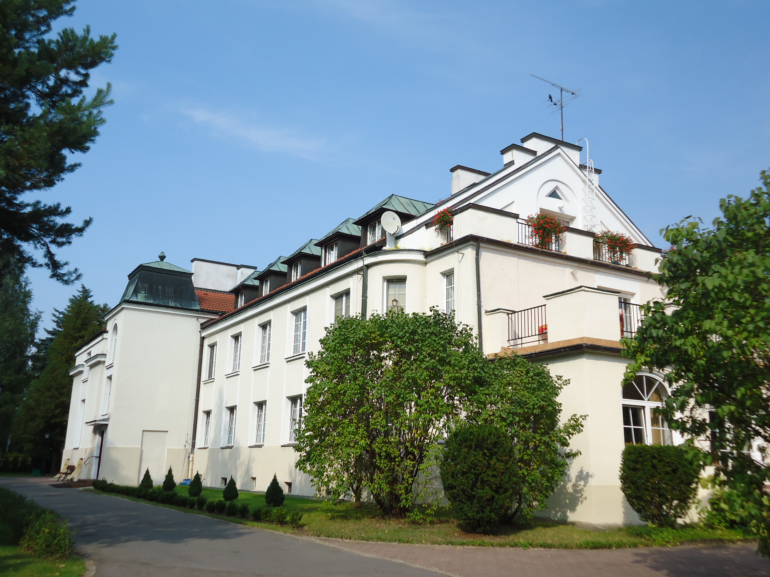 Konstancin-Jeziorna, budynek główny, tzw. Schronisko, 1927